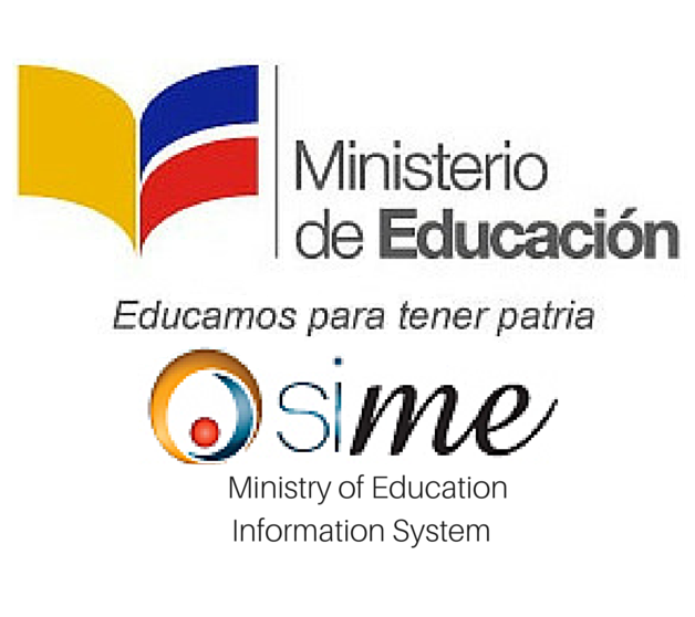 (Sime)Sistema de Información del Ministerio de Educación Ecuatoriano